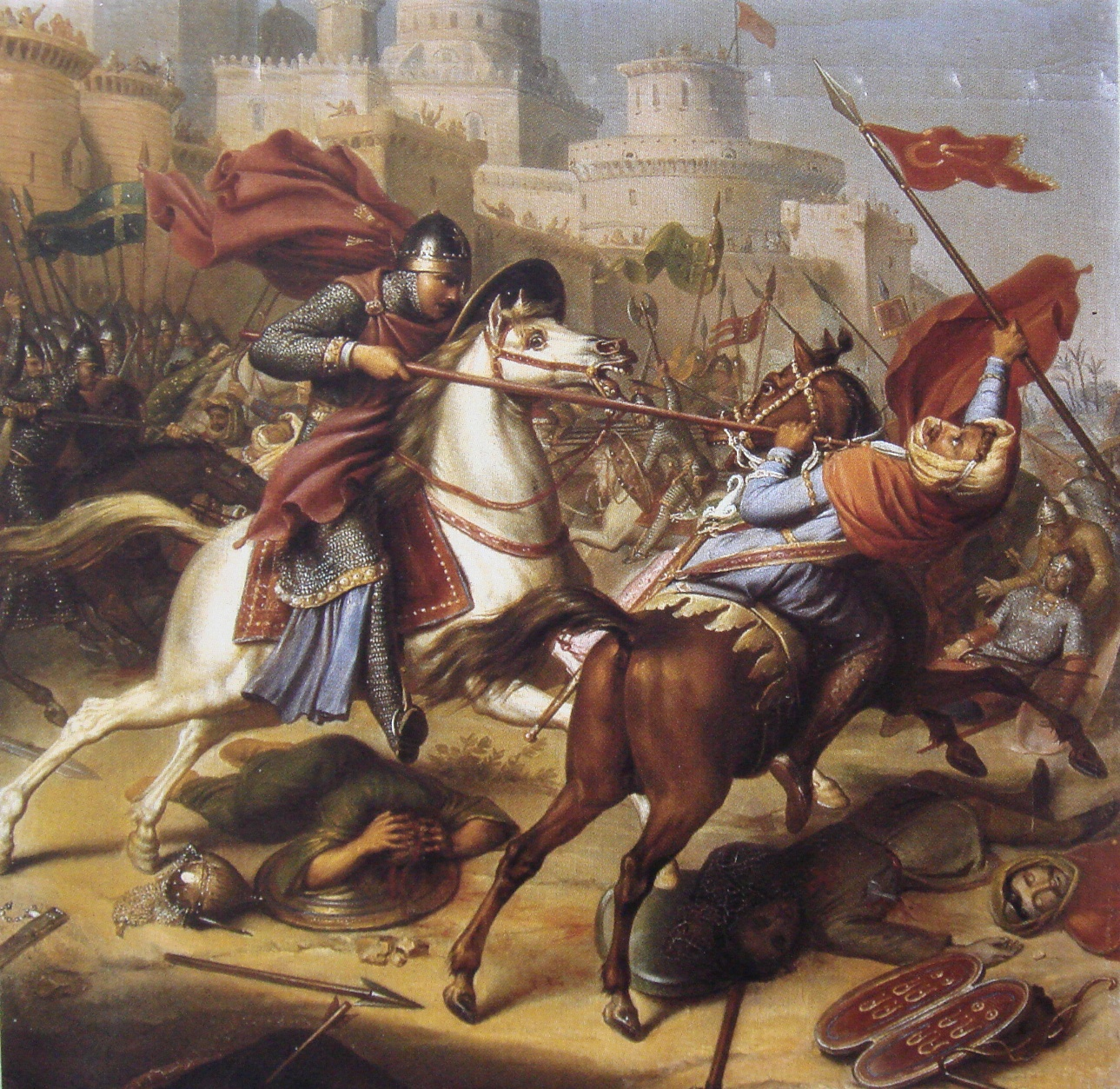 Combat de Robert, duc de Normandie, avec un guerrier sarrazin, 1098.